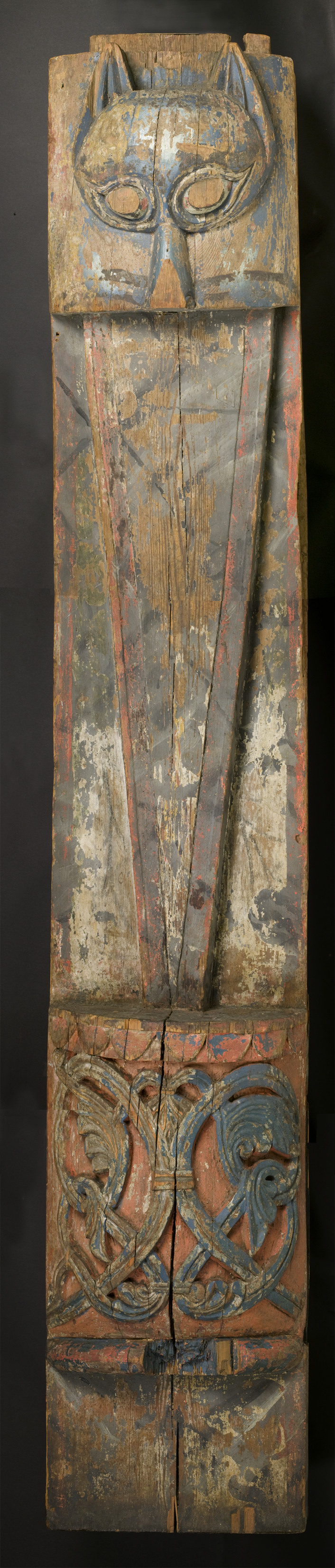 Stolpe fra Veggli stavkirke. Montasje av flere digitale filer fotografert av Eirik Irgens Johnsen. Fra Universitetsmuseenes fotoportal (jf. Museumsnummer: C3017.